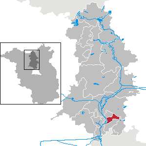 Birkenwerder in Brandenburg (Country) - District Oberhavel